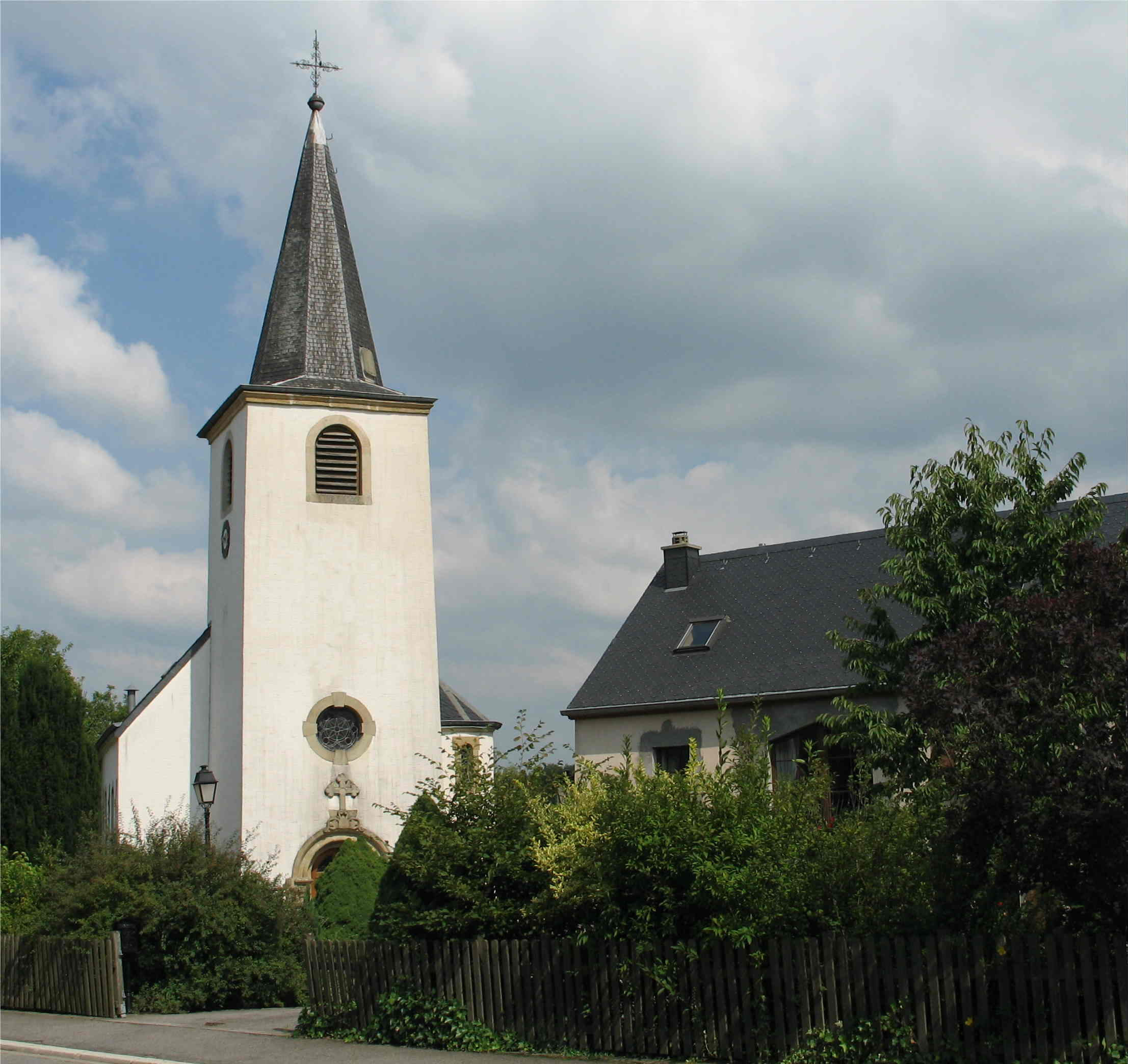 L'église de Roodt-sur-Syre (Luxembourg)